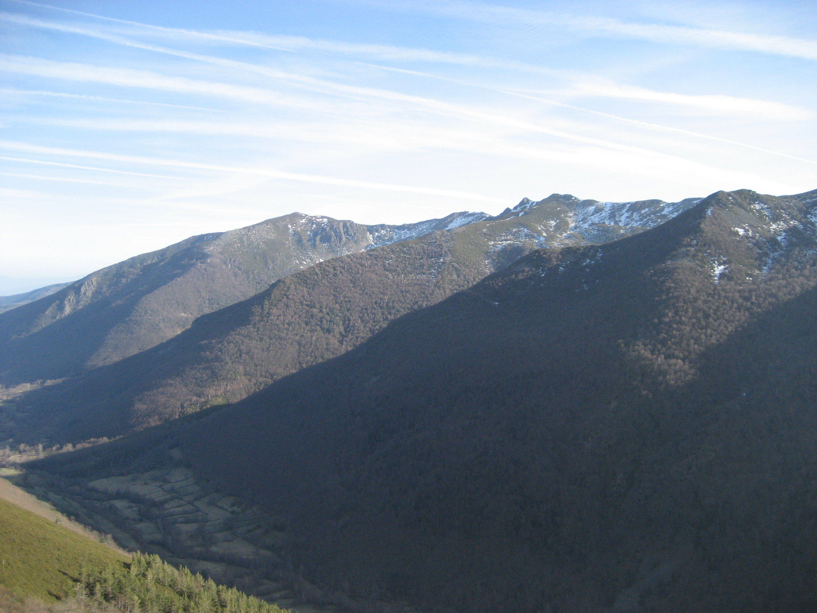 Montañas de Ancares cerca del puerto de Ancares (León, Castilla y León, España)